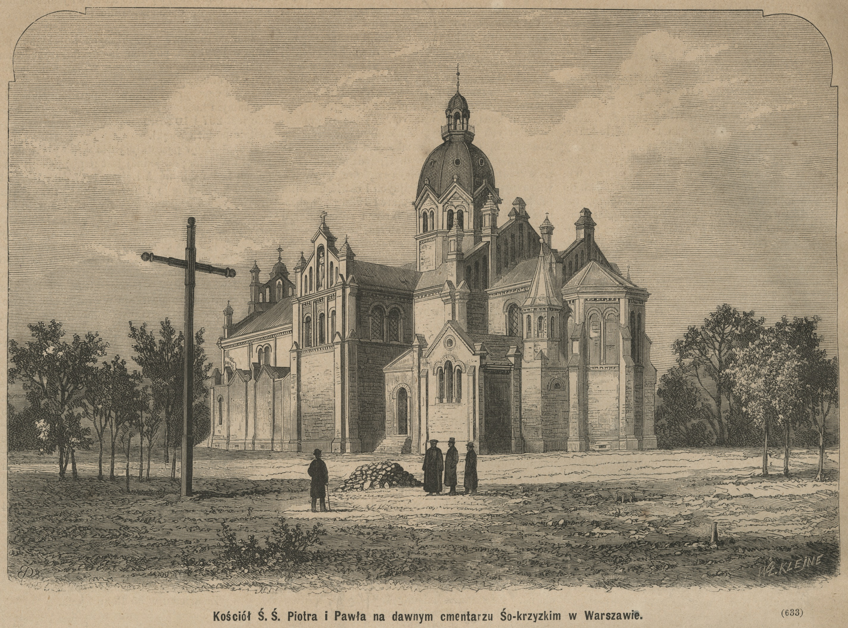 Kościół Ś. Ś. Piotr i Pawła na dawnym cmentarzu Śo-krzyzkim w Warszawie